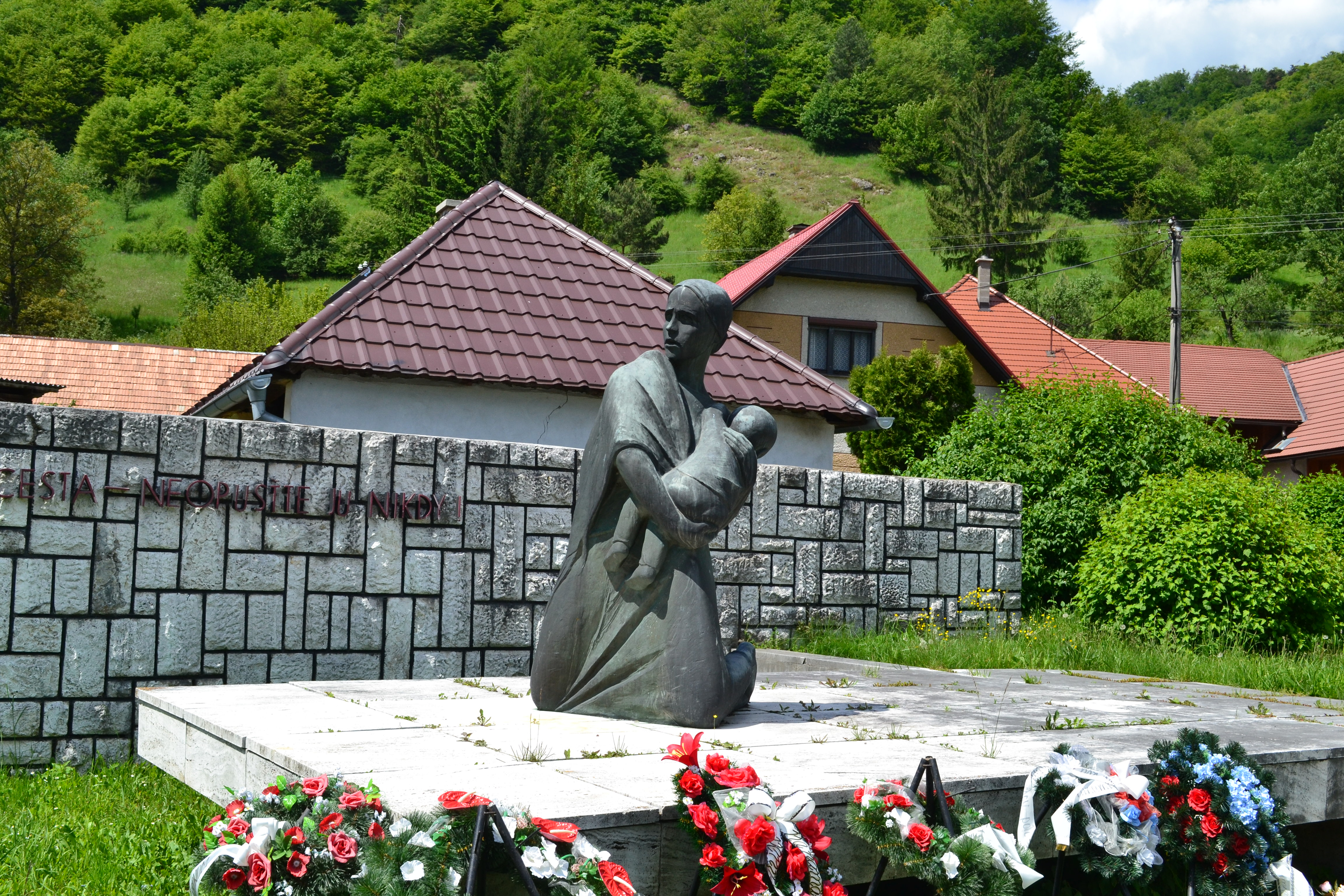 Pamätník v Ostrom Grúni venovaný obetiam nacistických represálií z 21. januára 1945. Súsošie matky brániacej dieťa bolo realizované v roku 1965.